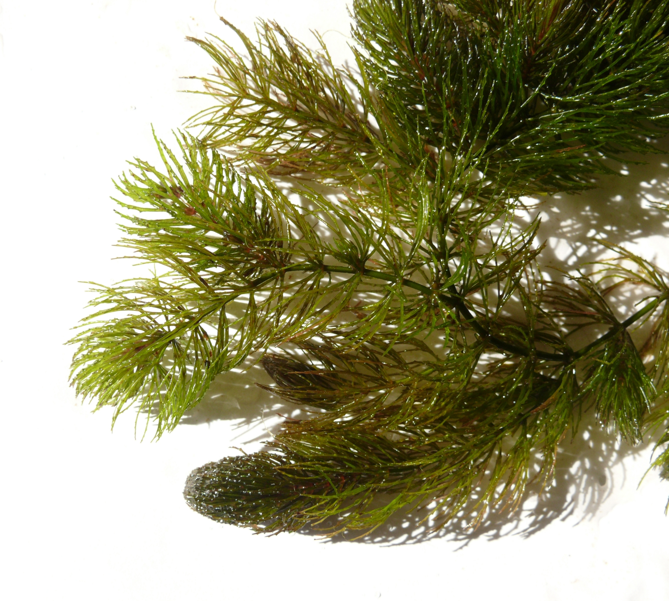 Ceratophyllum demersum, Schwäbisch-Fränkische Waldberge, Germany